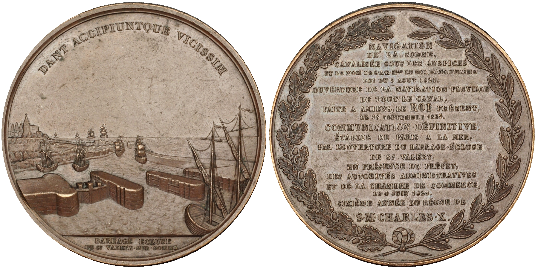 Navigation de la Somme canalisée (1827).